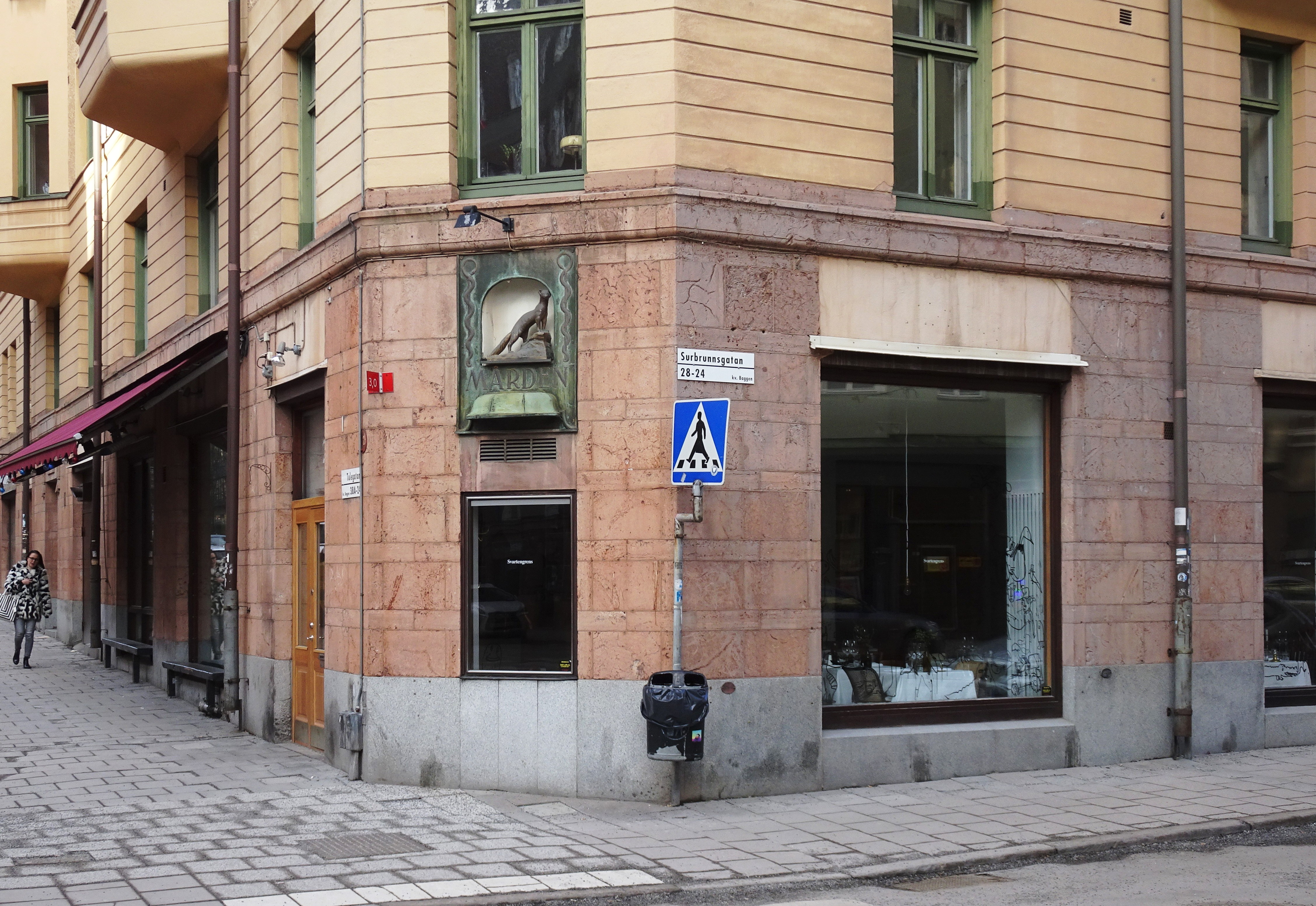 F.d. Apoteket Mårdens lokal